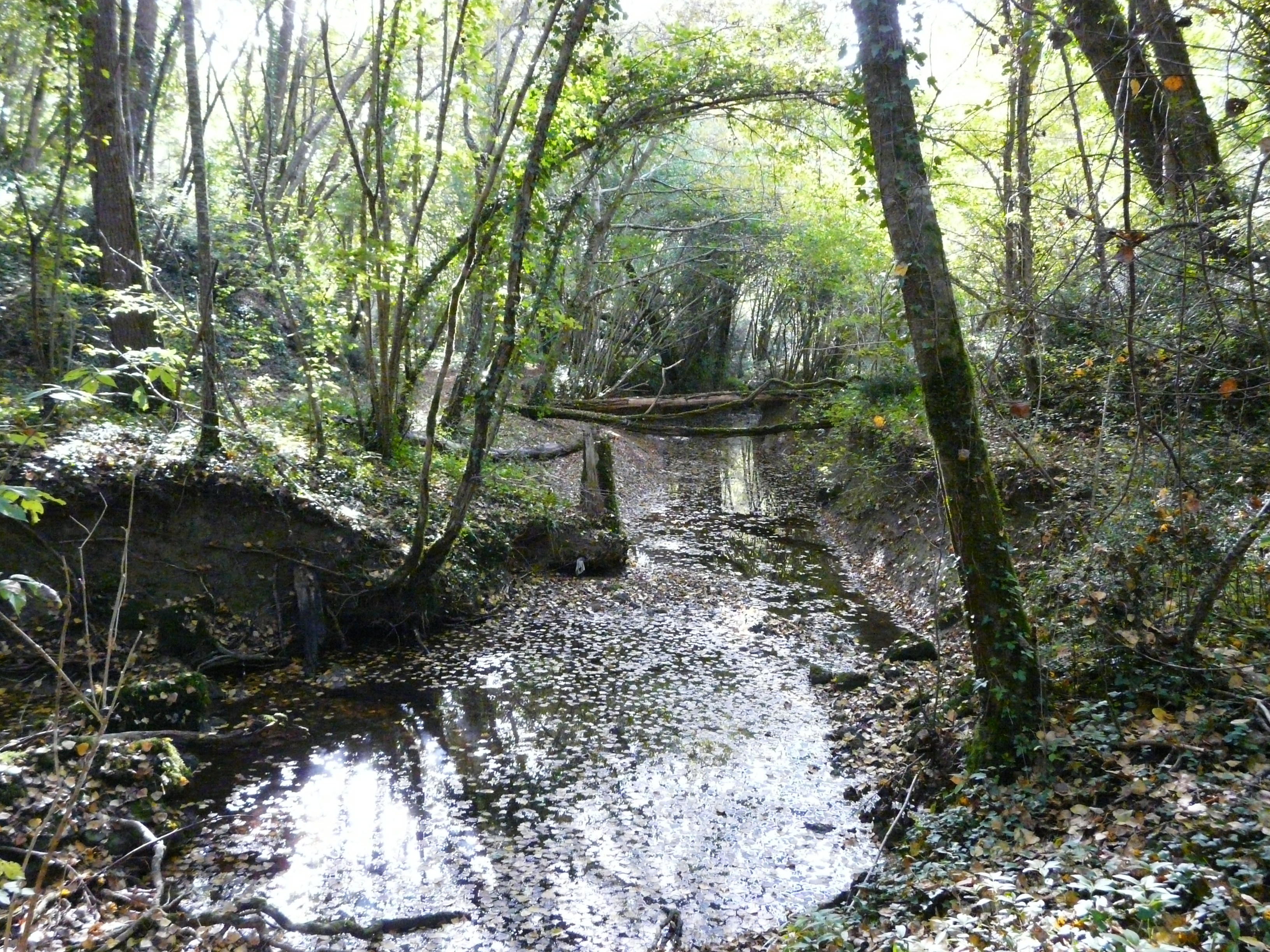 La Gardonnette vue depuis sa rive droite, Rouffignac-de-Sigoulès, Dordogne, France. Sur la rive gauche, commune de Singleyrac.